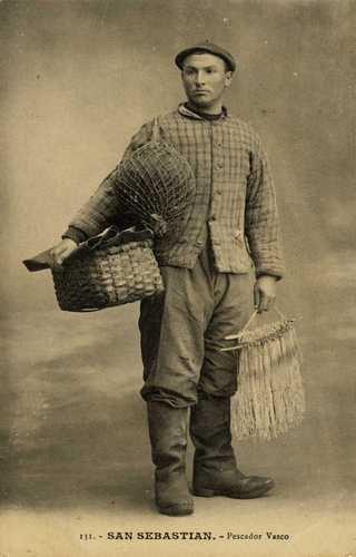 Euskal arrantzalea. Posta txartela. Argitaratzailea: G. G. Galarza